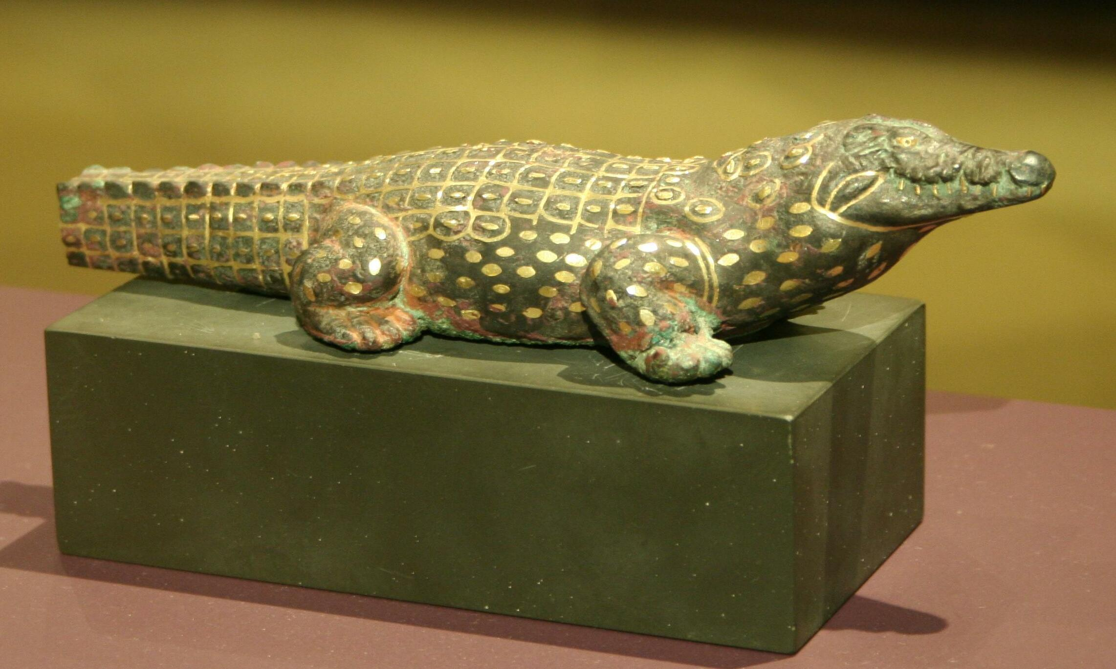 Statue einer Krokodilsgottheit, 12. Dynastie